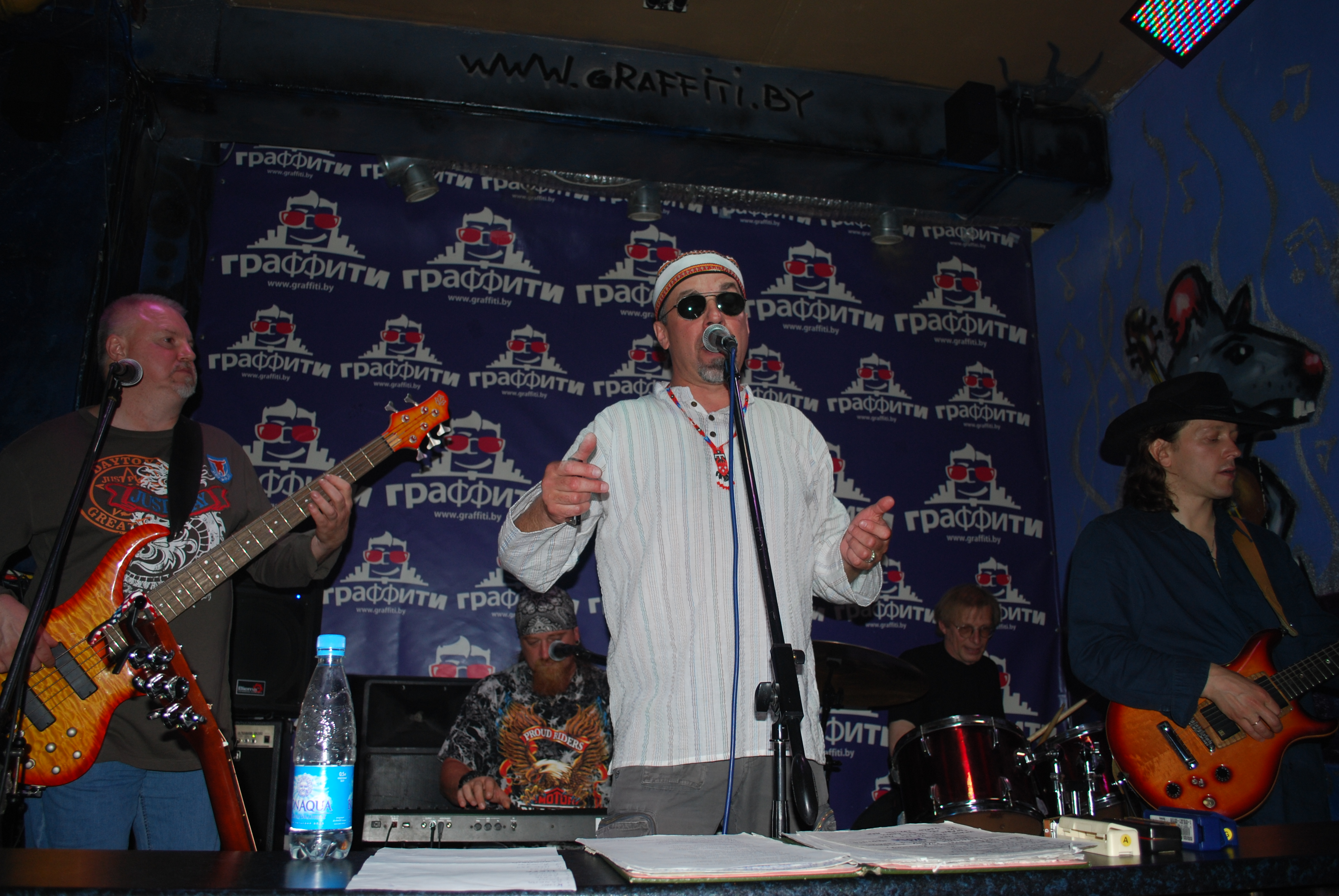 Беларуская (тарашкевіца): Выступ «Крамы» ў «Графіці»